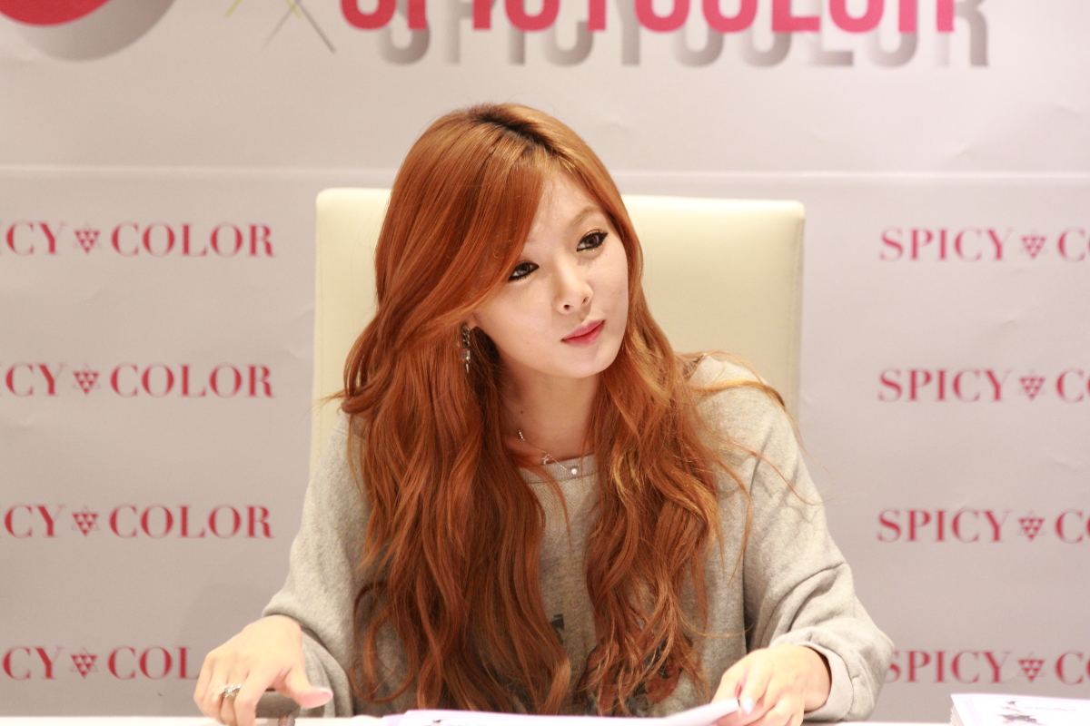 120819. 노원 현아 팬사인회